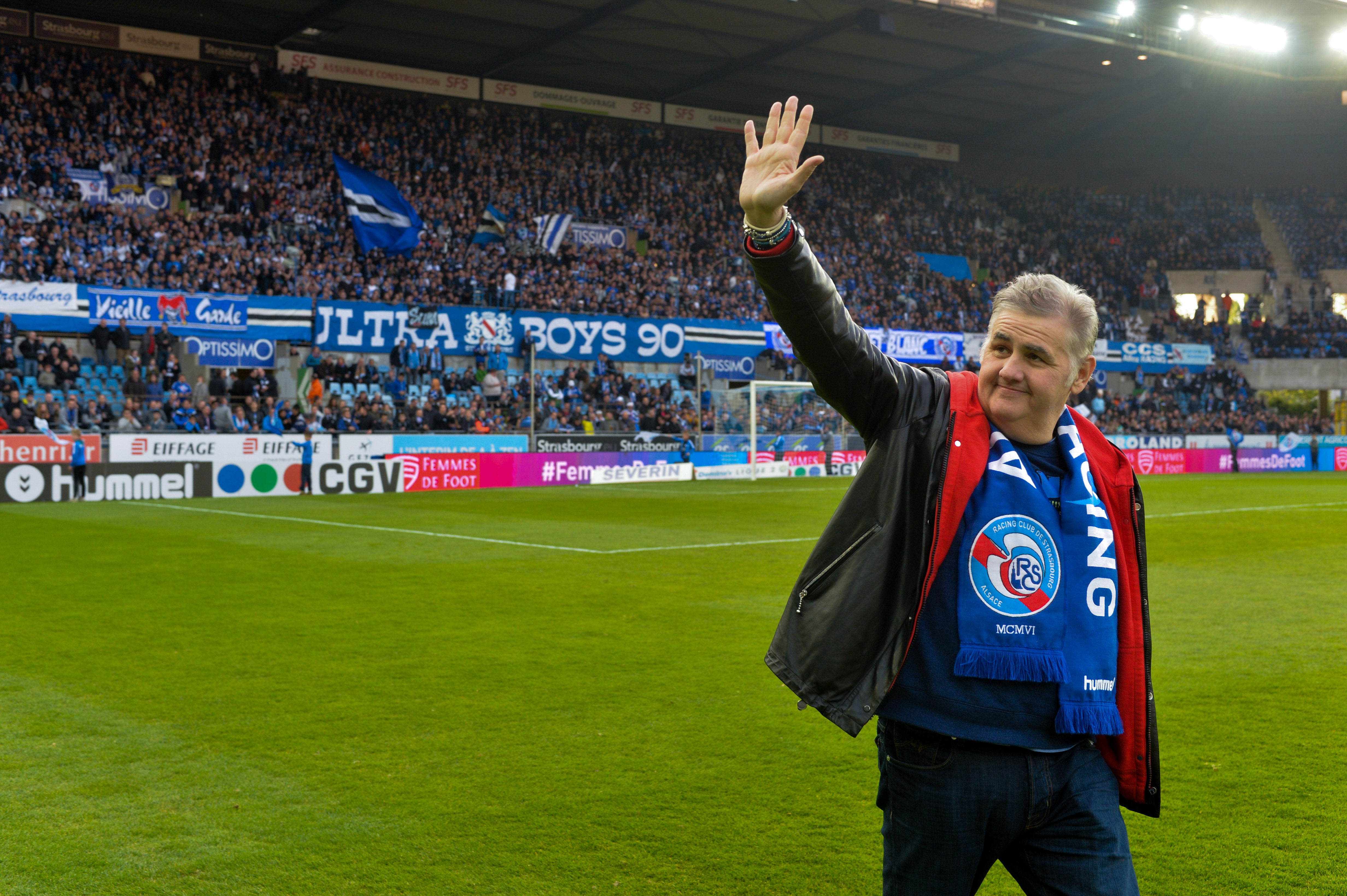 tifo RCSA Racing Club de Strasbourg Alsace au stade de la Meinau. photo Franck KOBI / Haguenau port 06.81.38.09.98 Pierre Menes au stade de la Meinau